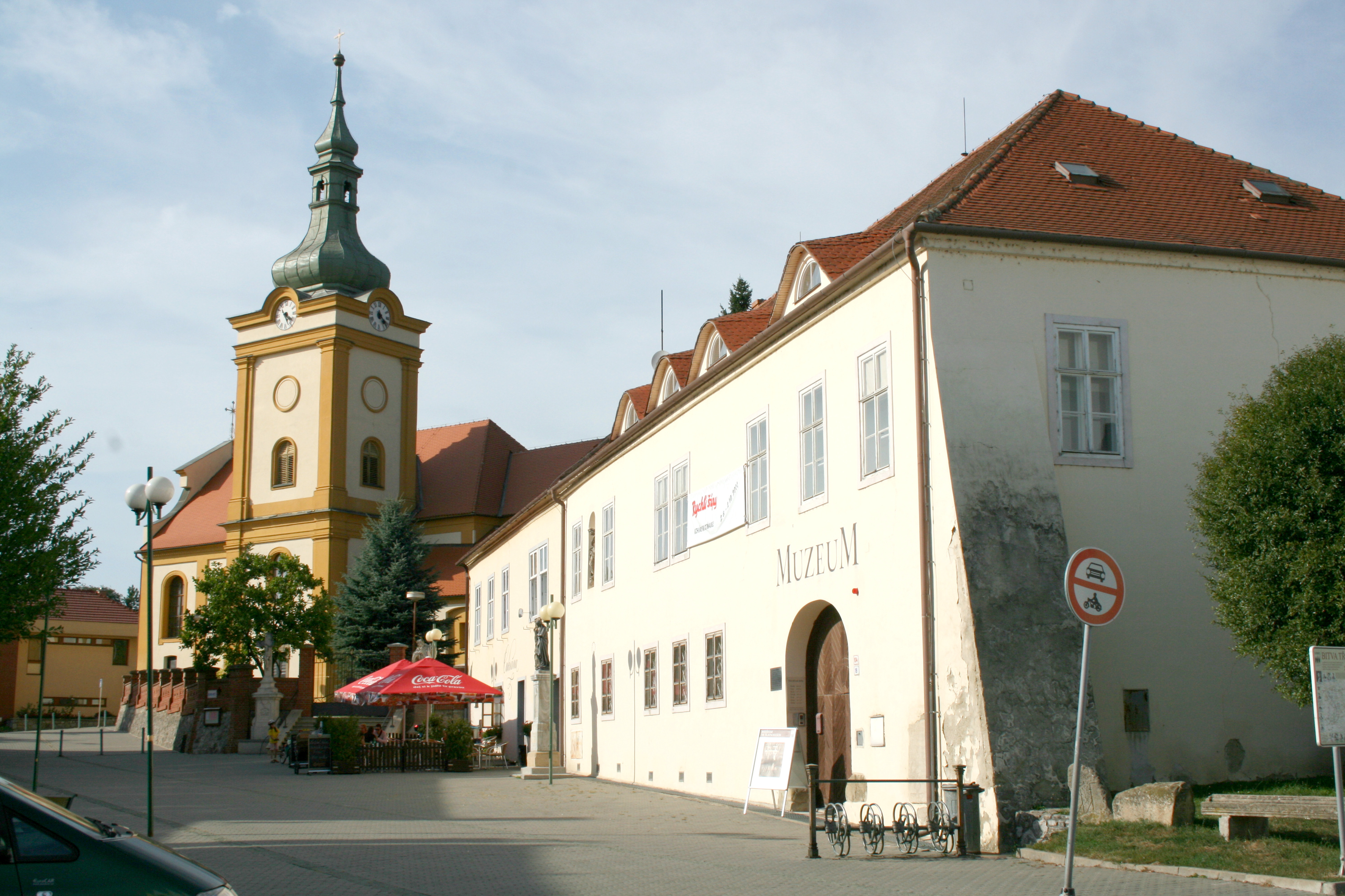 Masarykovo náměstí ve Šlapanicích s kostelem Nanebevzetí Panny Marie a muzeem v budově někdejší scholasterie. Pohled od jihovýchodu.